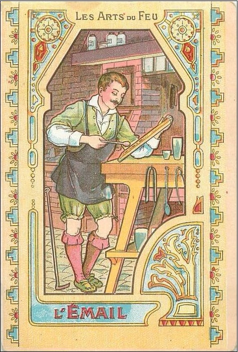 Les Arts du Feu ; L'Émail